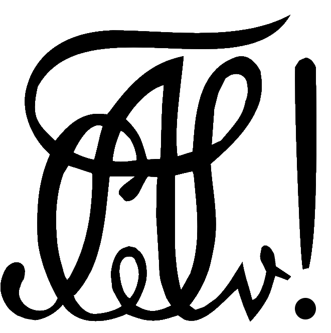 Der Zirkel der AMVW